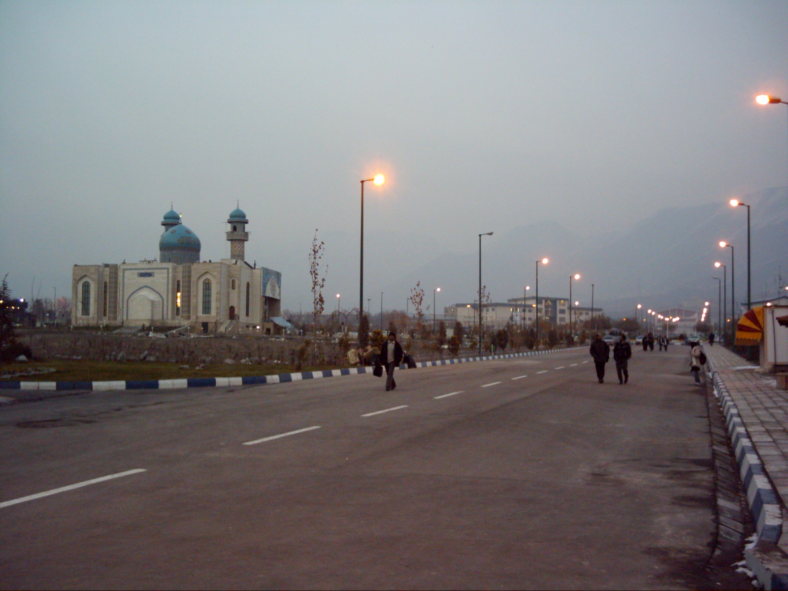 نمایی از یکی از خیابان های دانشگاه آزاد اسلامی واحد کرج و مسجد دانشگاه آزاد اسلامی واحد کرج